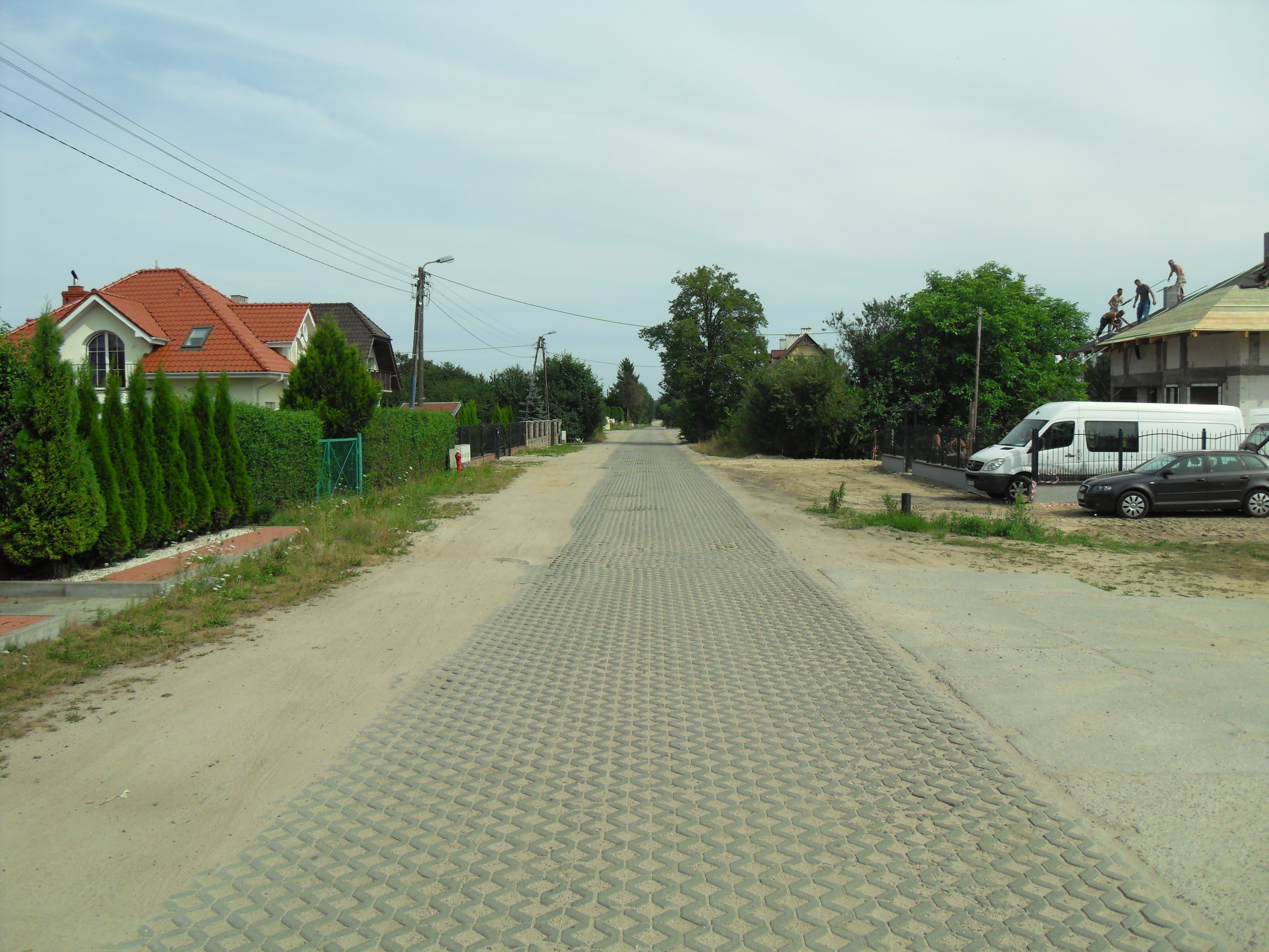 Gdańsk Barniewice (Osowa), ul. Wenus.